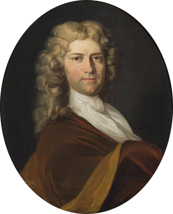 Bildnis Daniel Tschiffeli (1664-1730), obrigkeitlicher Buchdrucker.